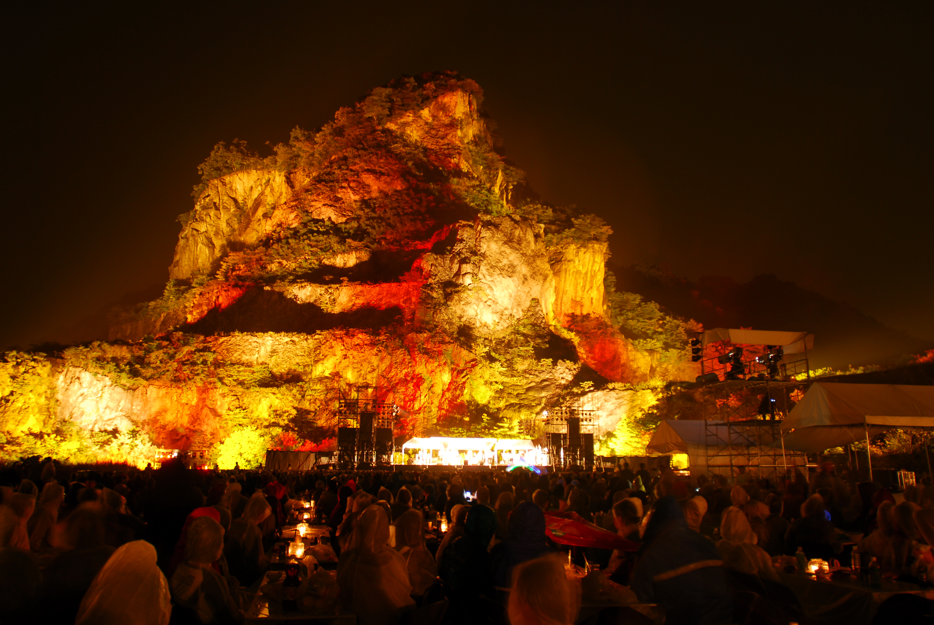 クリフステージ＃08 ステージと崖のライトアップ